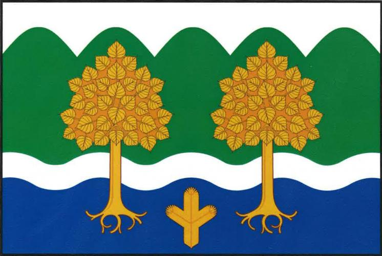 Krhová vlajka